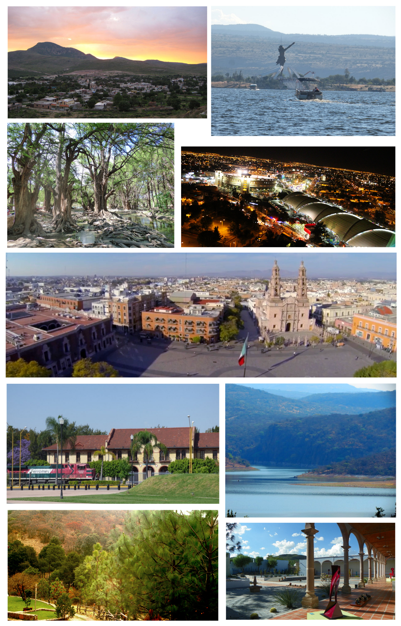 Montaje del Estado mexicano de Aguascalientes. De izquierda a derecha y de arriba a abajo: Real de Asientos pueblo mágico, Presa Plutarco Elías Calles, El Sabinal, Feria Nacional de San Marcos, centro histórico de la ciudad de Aguascalientes, Barrio de la Estación y complejo ferrocarrilero, Calvillo, Sierra Fría, Museo de la Insurgencia (parte del Camino Real a Santa Fe)